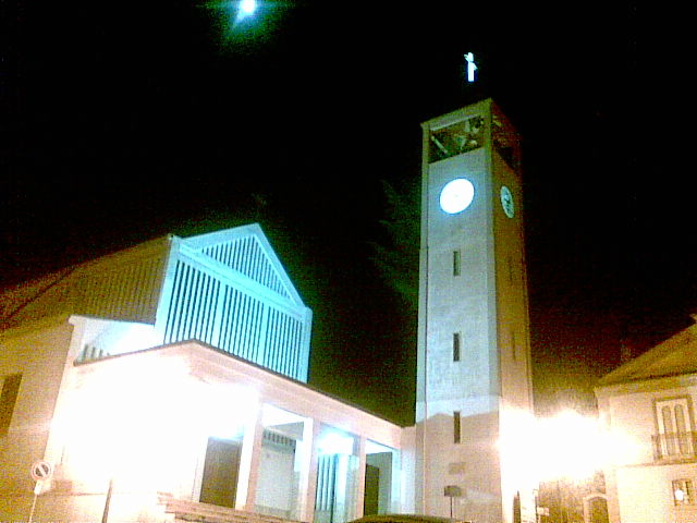 Sturno, provincia di Avellino, Italia - Chiesa.